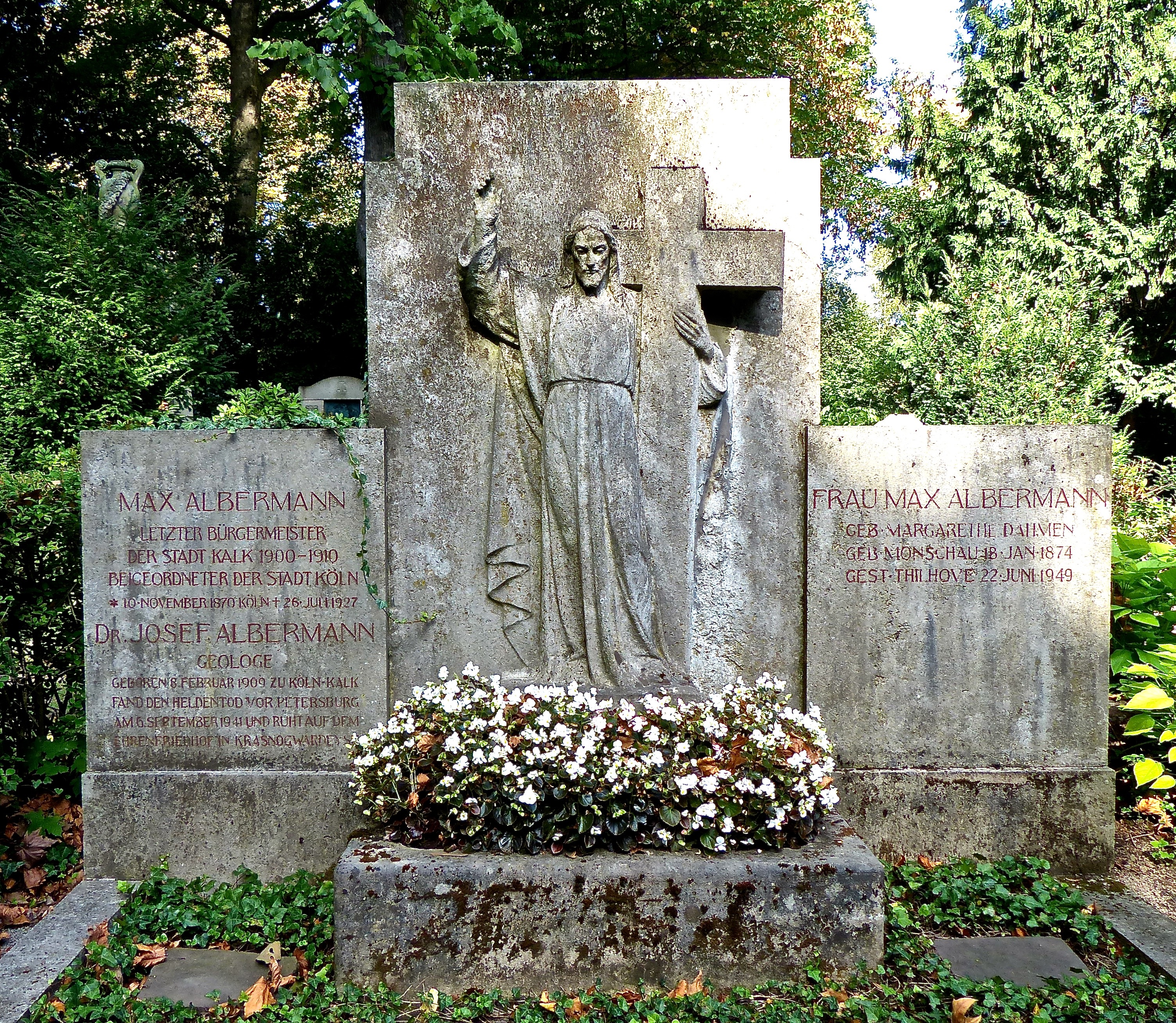 Grabstätte von Max Albermann, letzter Bürgermeister von Kalk und Dr. Josef Albermann (Geologe) auf dem Friedhof Melaten (Flur 20 in E)